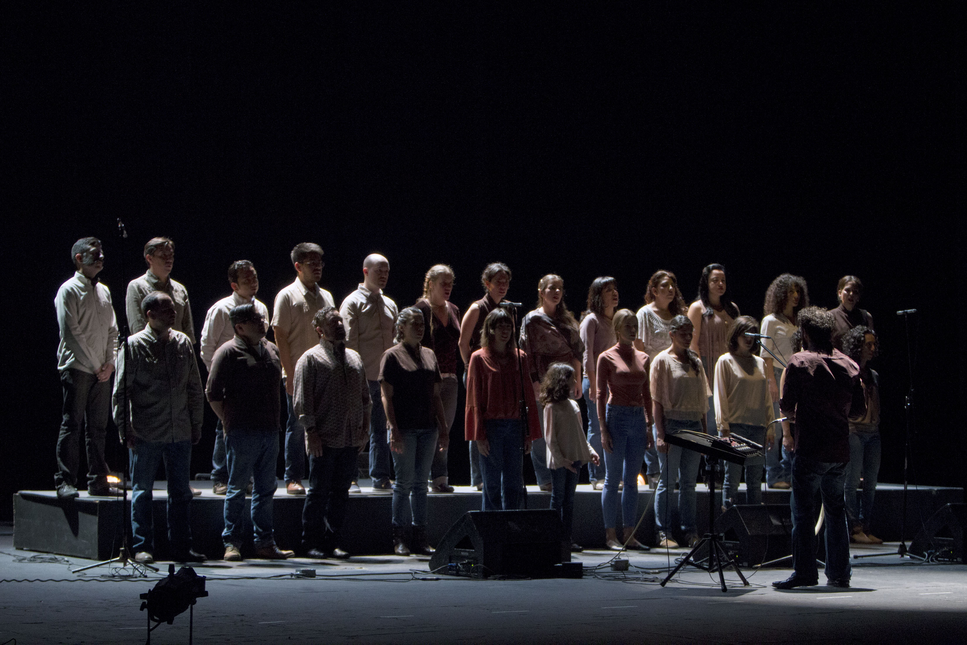 Sábado 1 de octubre de 2016 En el Teatro de la Ciudad Esperanza Iris se presentó el espectáculo Al pie de un árbol. Celebrando el canto Cardenche, a cargo de Los Cardencheros de Sapioriz y el Coro Acardenchado, dirigido por Juan Pablo Villa. Fotografía: Maritza Rios / Secretaría de Cultura CDMX